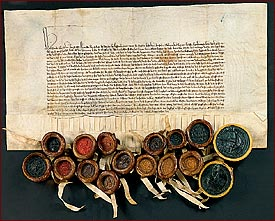 Treaty between Deutscher Orden and Gotland in 1399